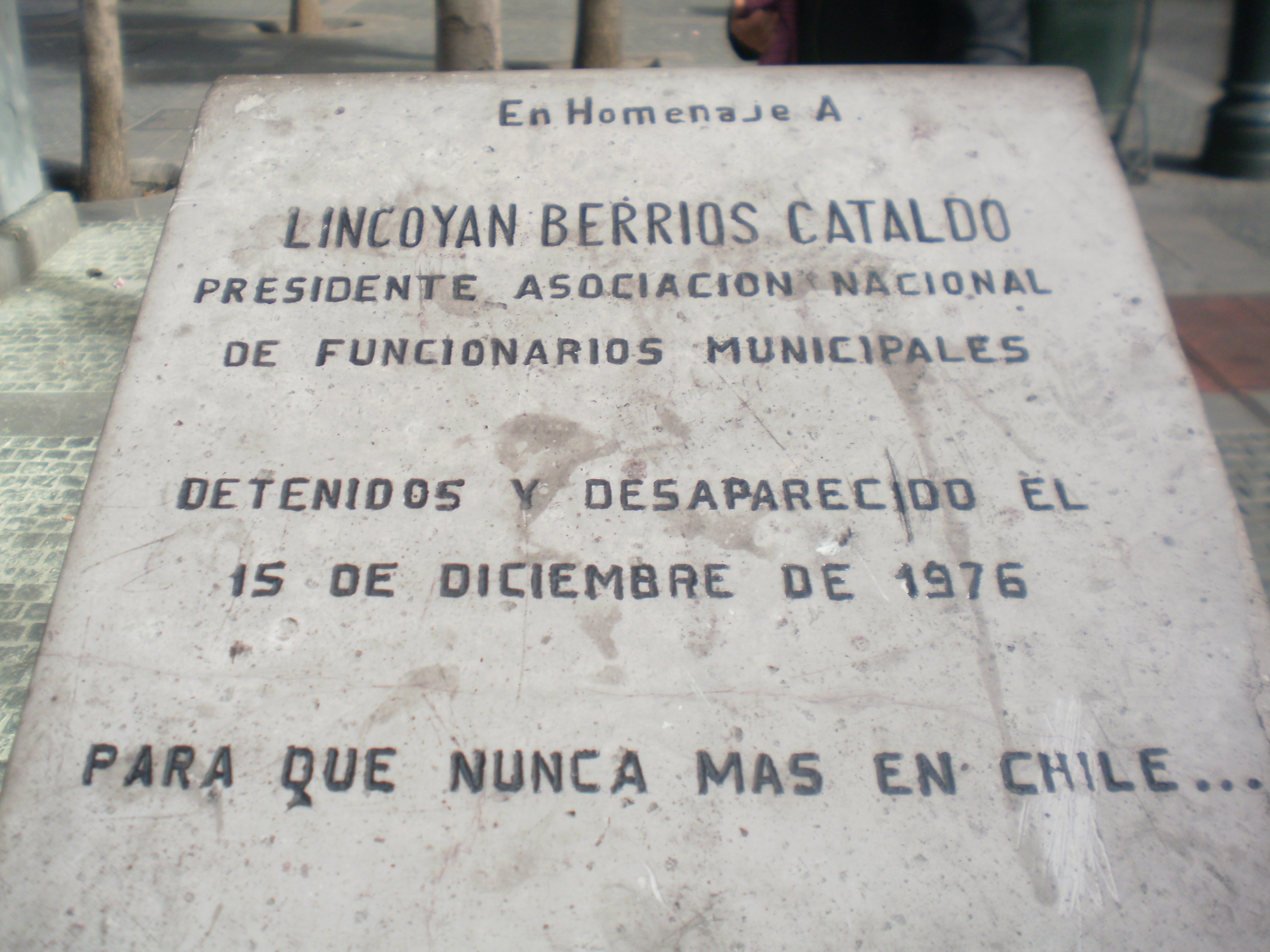 Placa recordatoria de un sindicalista desaparecido por la dictadura del general Pinochet en Chile post golpe de estado.